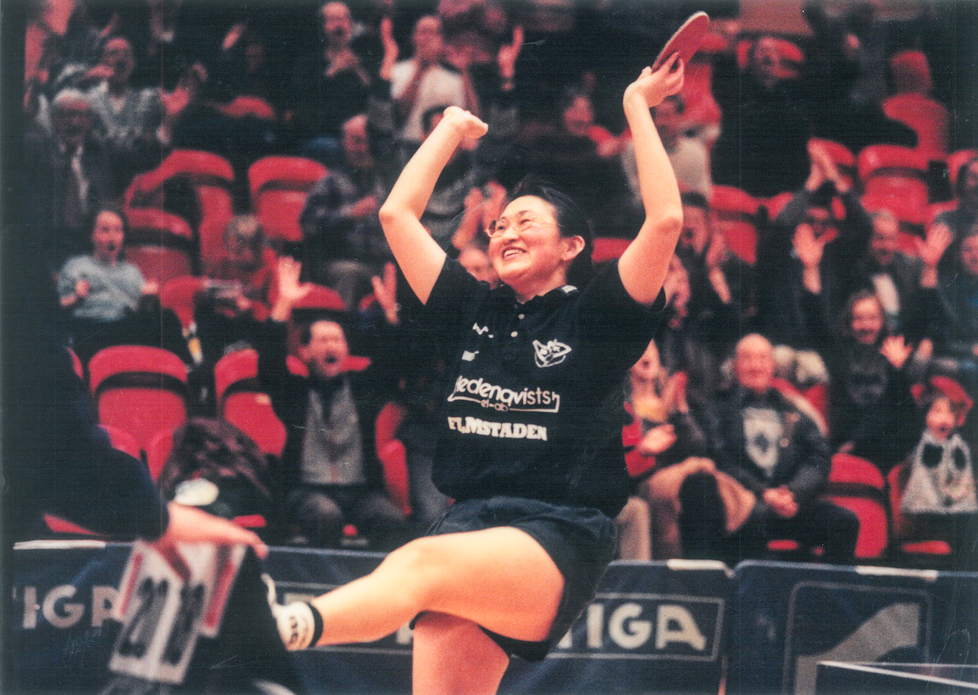 Sista matchboll när Yue Xia Wang Fridén vann SM 1998 med Norrköpings BTK